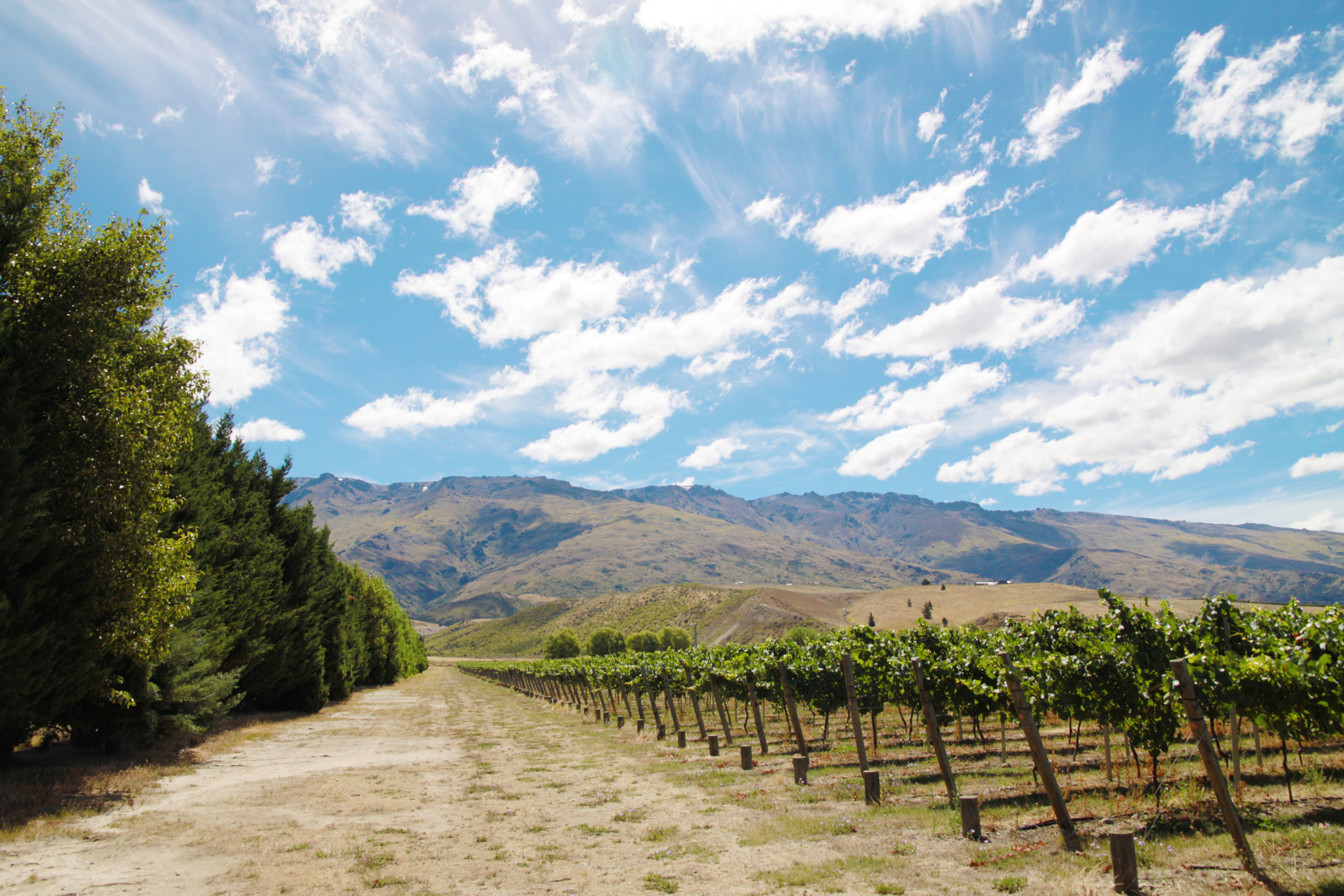 Vignoble d'Amisfield, près du Mont Pisa, Central Otago